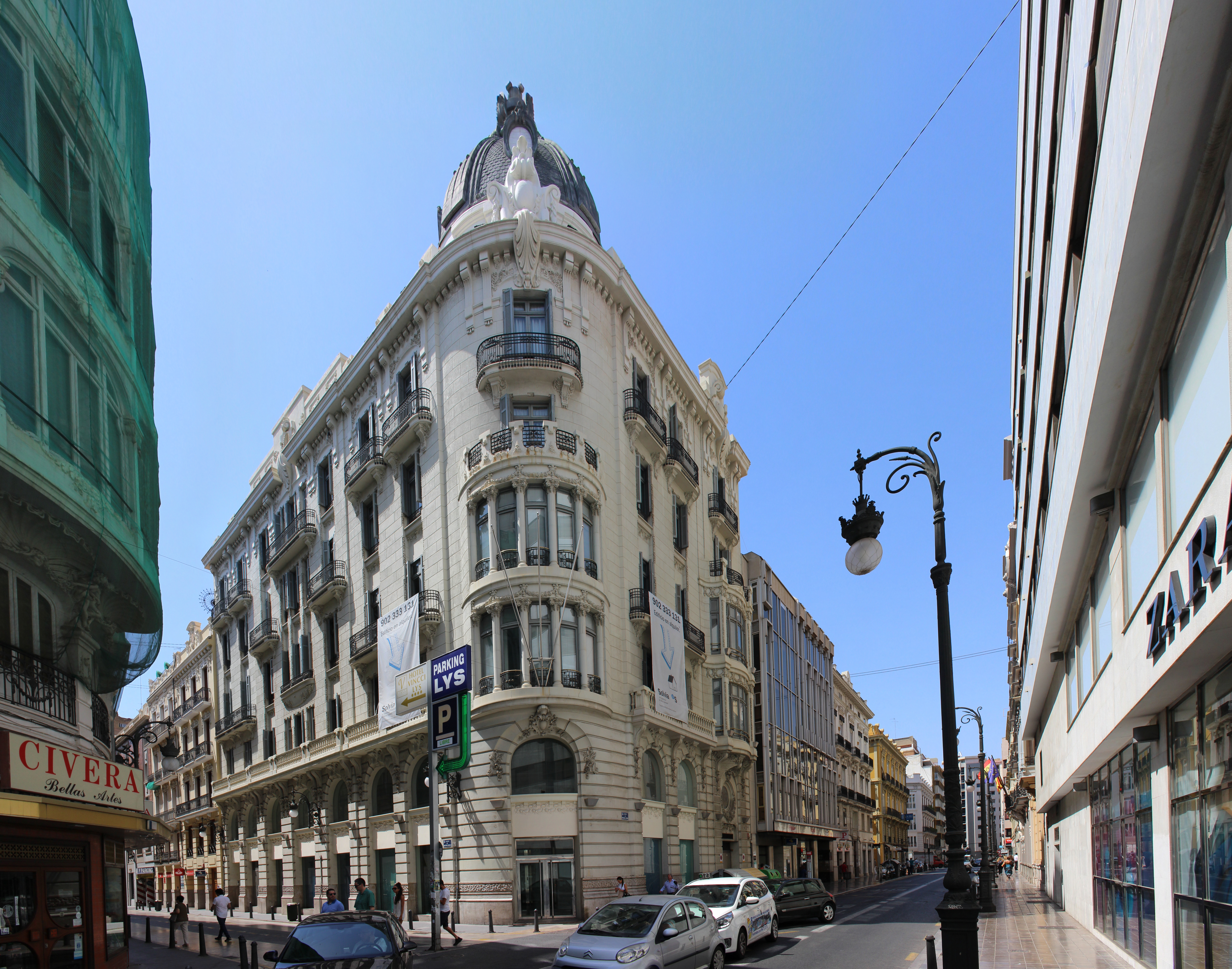 Casa Niederleytner (1916) en Pascual y Genís 22-24 de Francisco Javier Goerlich Lleó